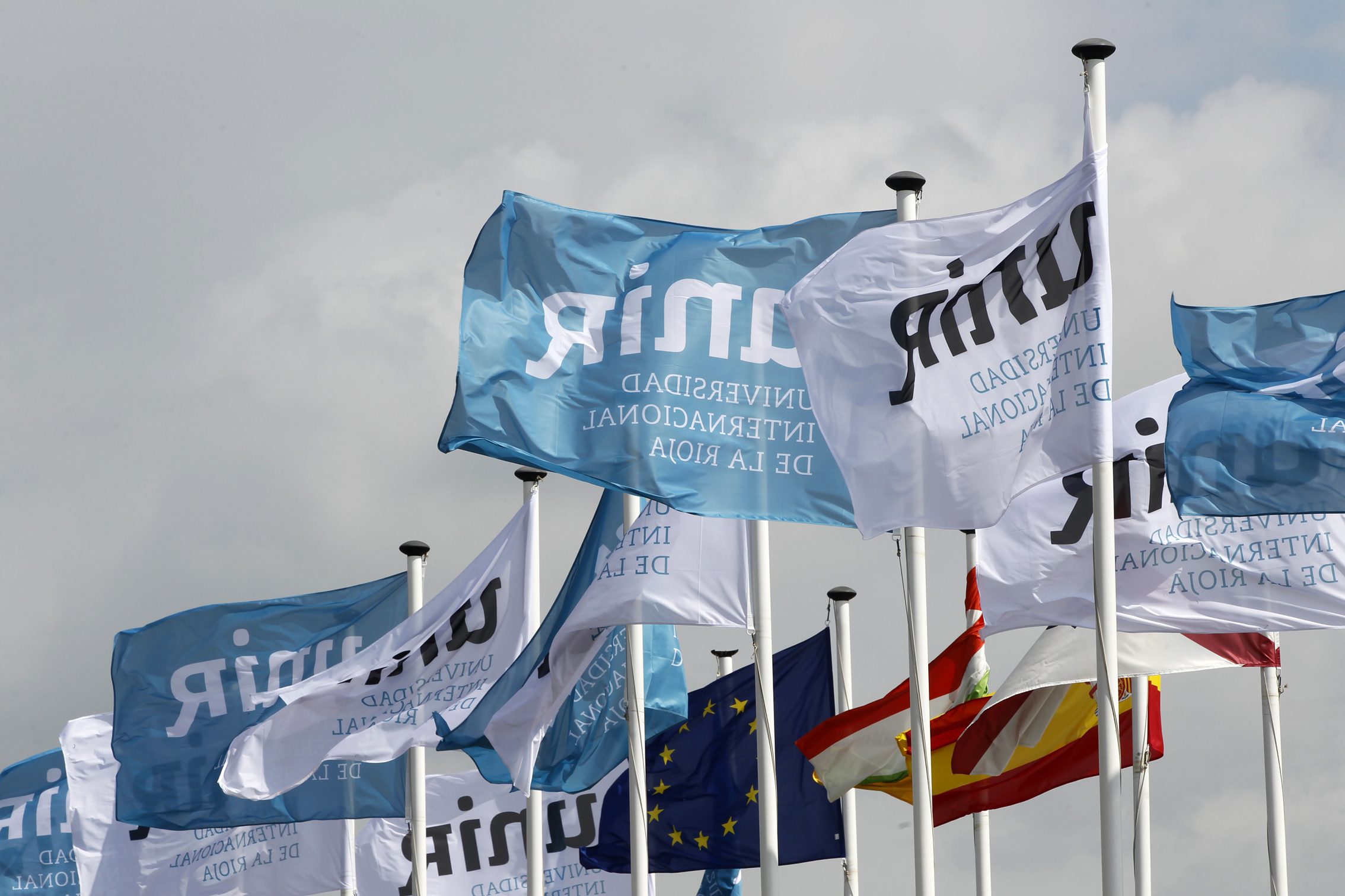 Imagen tomada durante la primera graduación de estudiantes de UNIR, la Universidad Internacional de la Rioja, el 1 de junio de 2013.